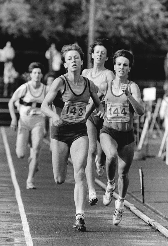 Christine Wachtel, Sigrun Wodars ADN-ZB Oberst 6.6.87-wo-Potsdam: Leichtathletik-WM-Qualifikation- Das 800-m-Rennen der Frauen am 5.6.87 gewann die Neubrandenburgerin Christine Wachtel (l.) (1:57,09 min) vor ihrer Klubkameradin Sigrun Wodars (r.) (1:57,23 min).